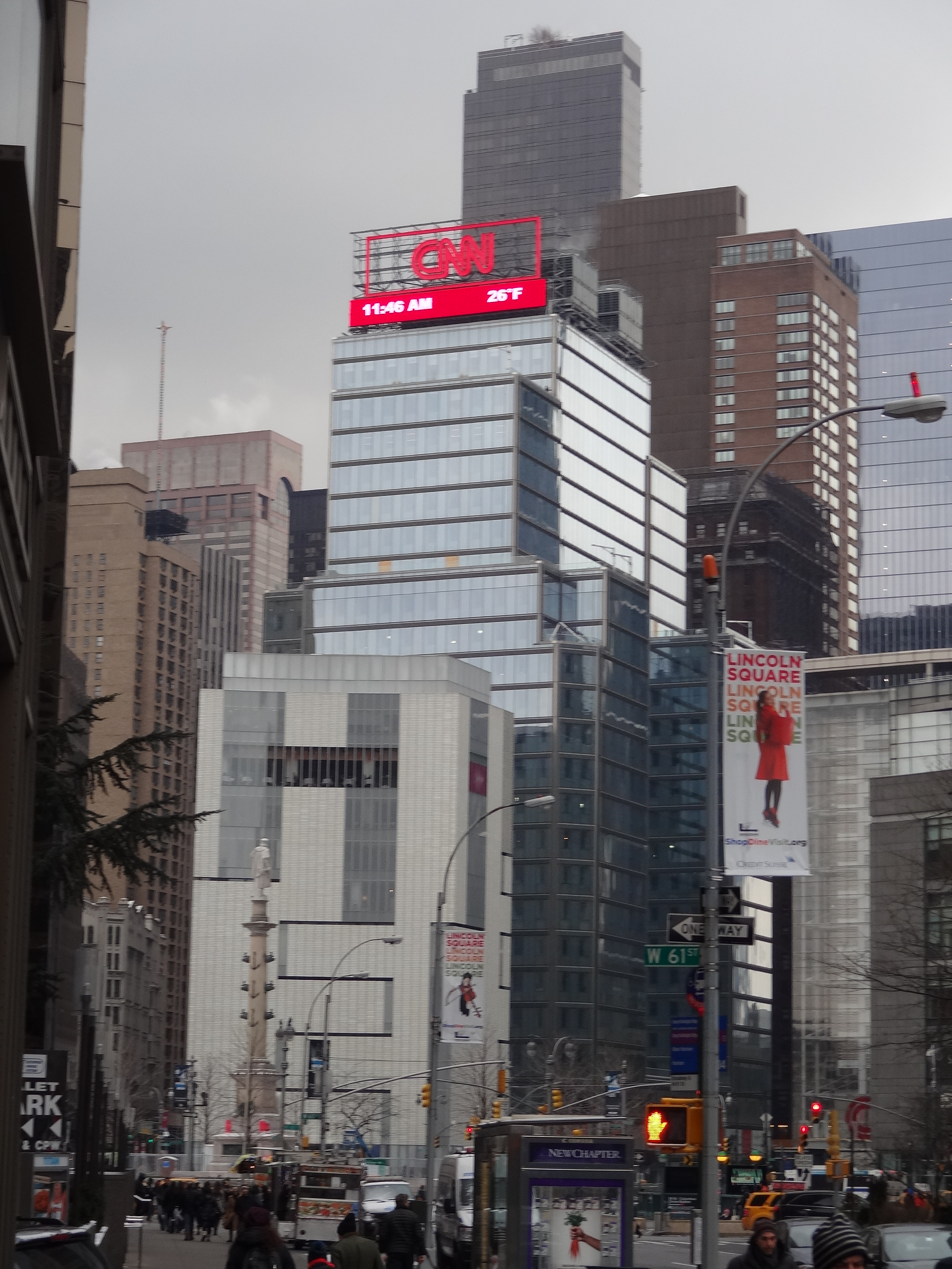 Prédio da CNN em Nova Iorque.